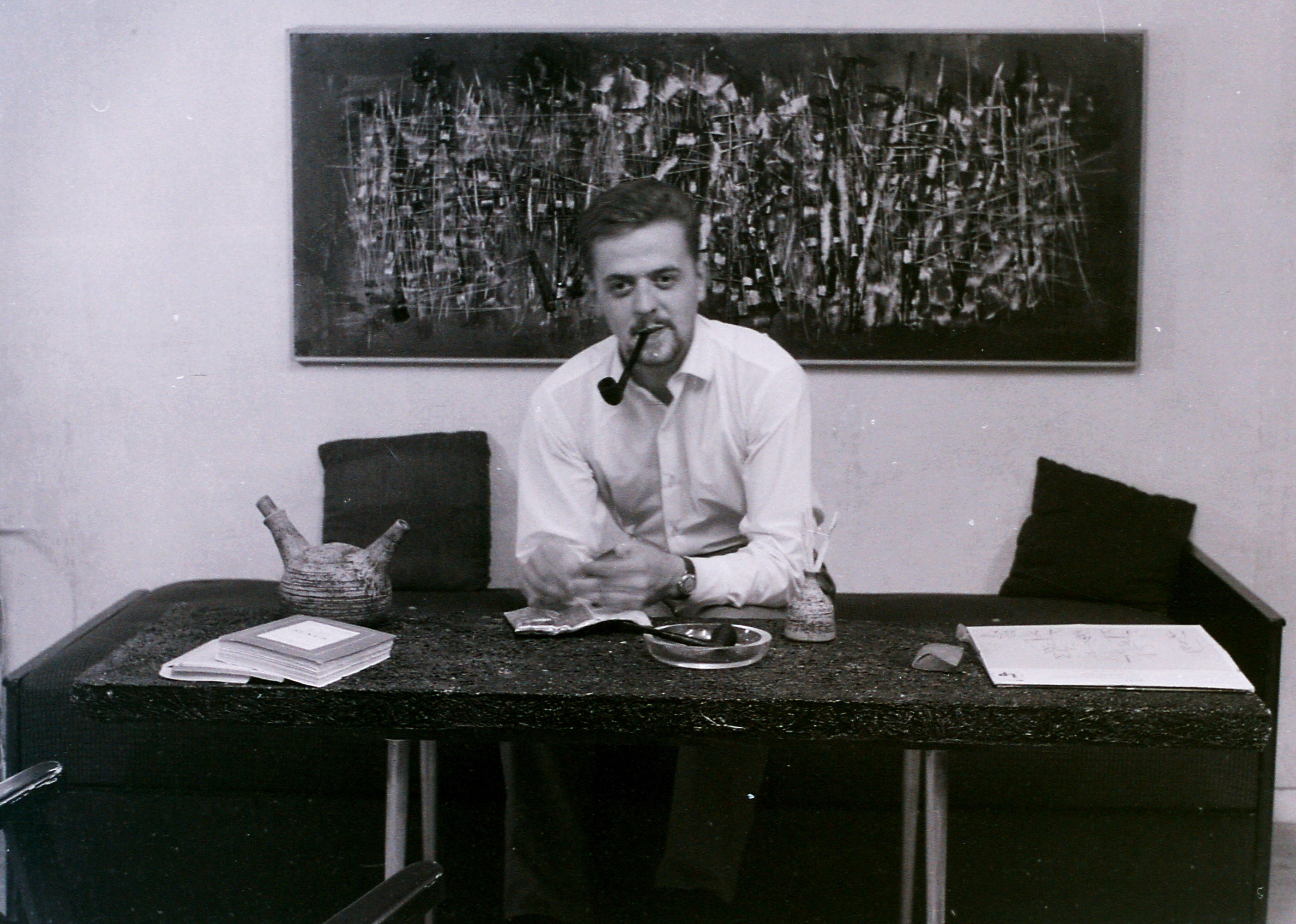 Sven Inge (tidigare Sven Inge Höglund och Sven Inge Demonér) ; 1935-2008 ; konstnär. Foto 1960